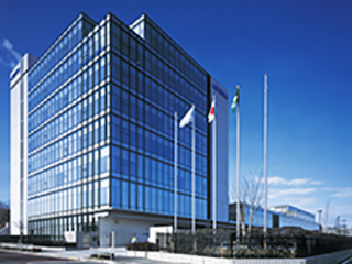 JUKI CORPORATION 本社社屋の画像